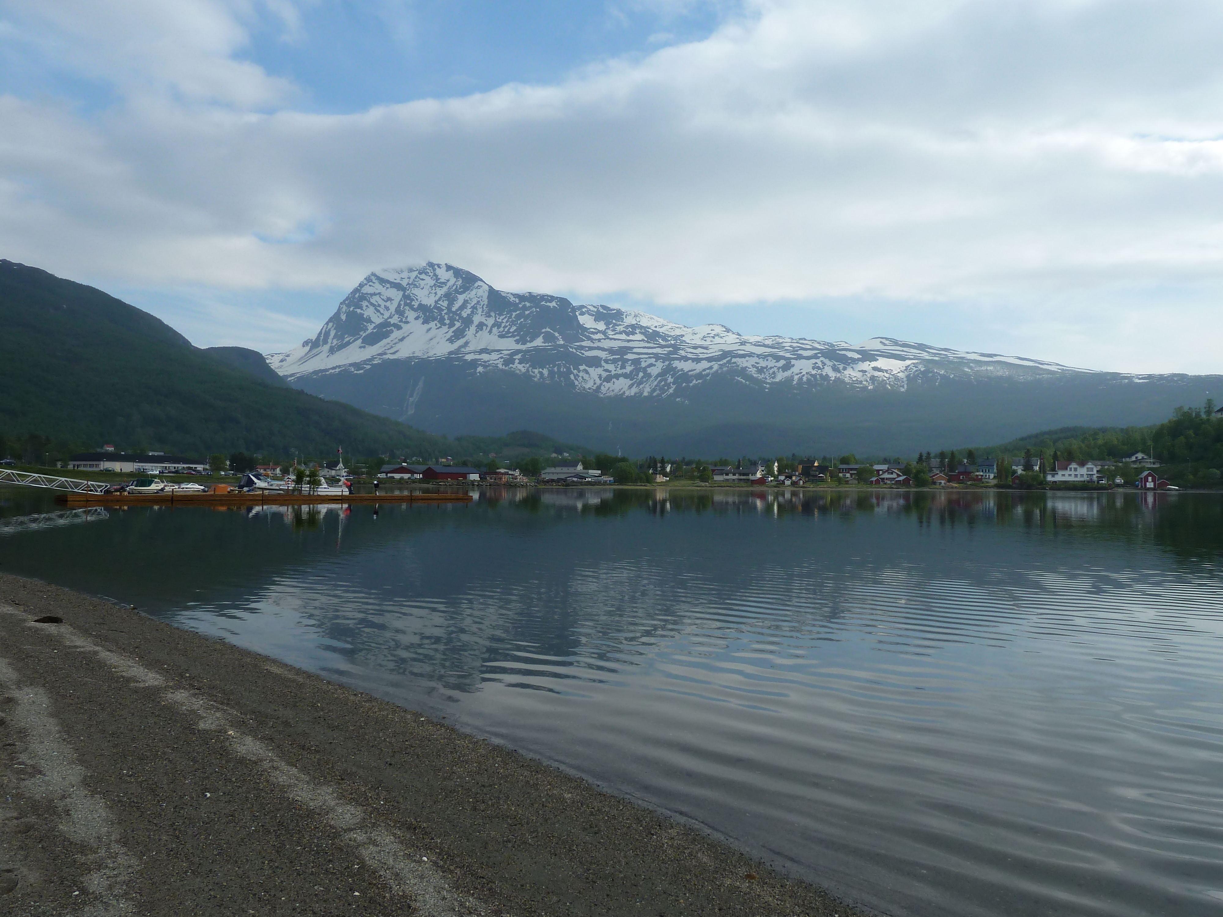 Utsikt mot Tennevoll i Lavangen sett fra Soløy-siden av fjorden.